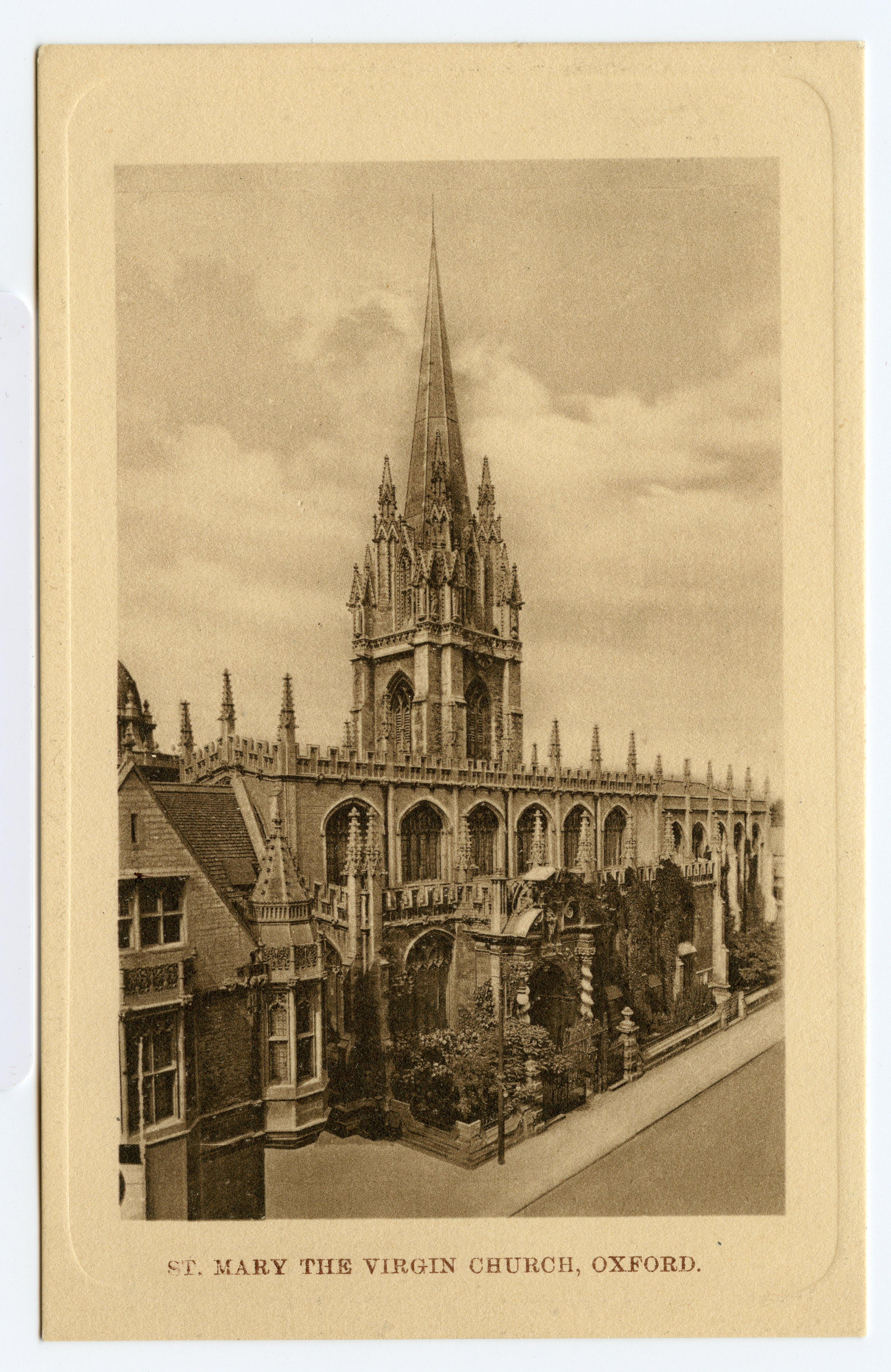 Kościół uniwersytecki św. Marii Dziewicy w Oksfordzie (St. Mary the Virgin Church) na starej pocztówce, własność Roberta Pieńkowskiego z Wrocławia